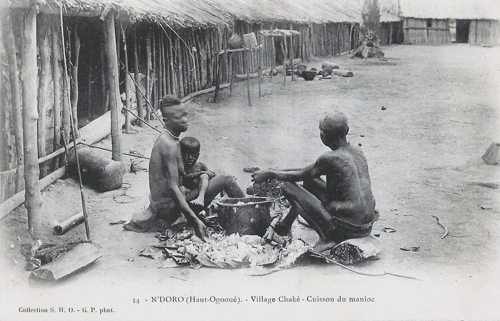 N'Doro (Haut-Ogooué). Village Chaké. Cuisson du manioc. Collection S.H.O. G.P. phot.